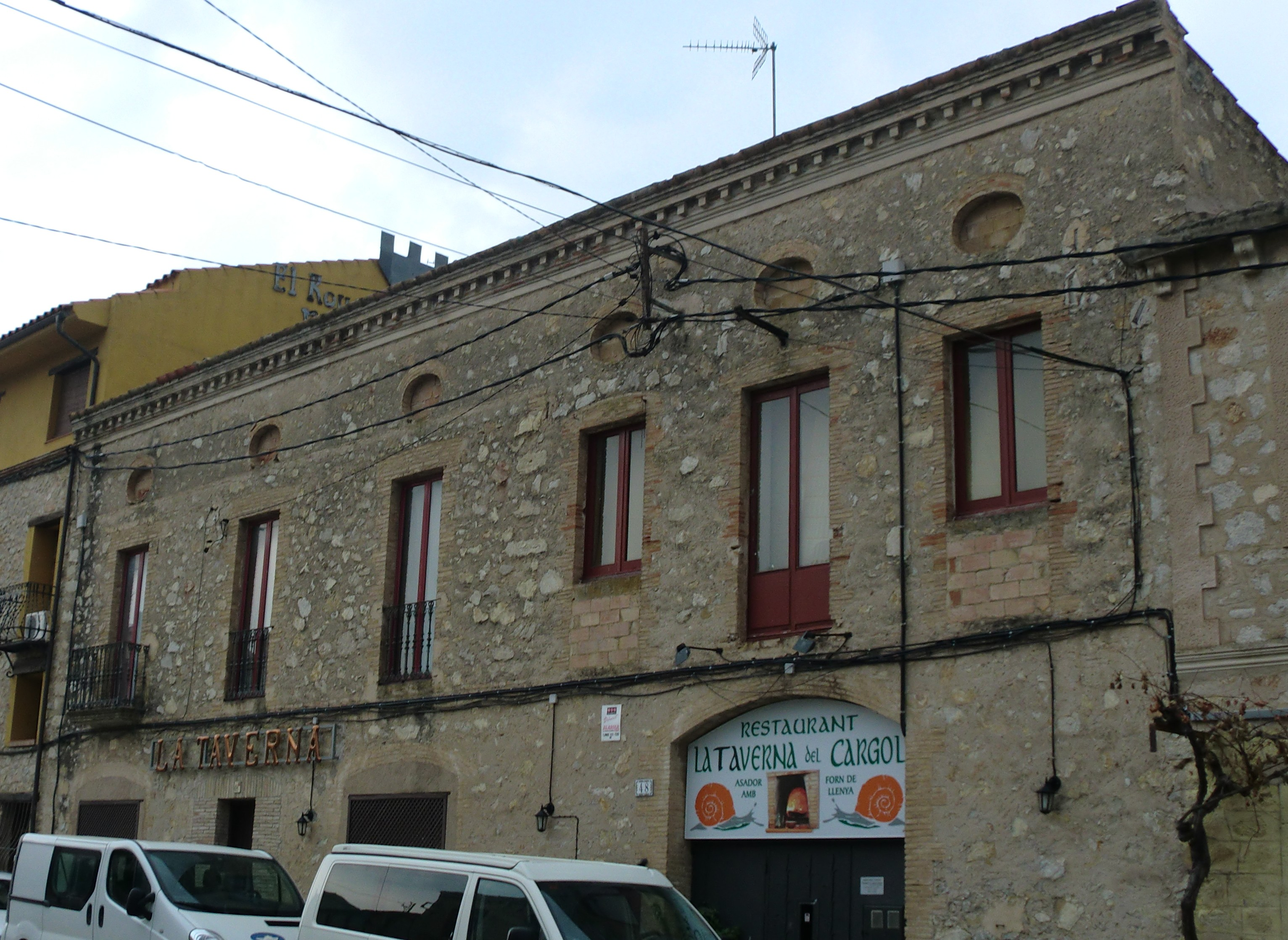 Can Masnou (Pont de Molins)